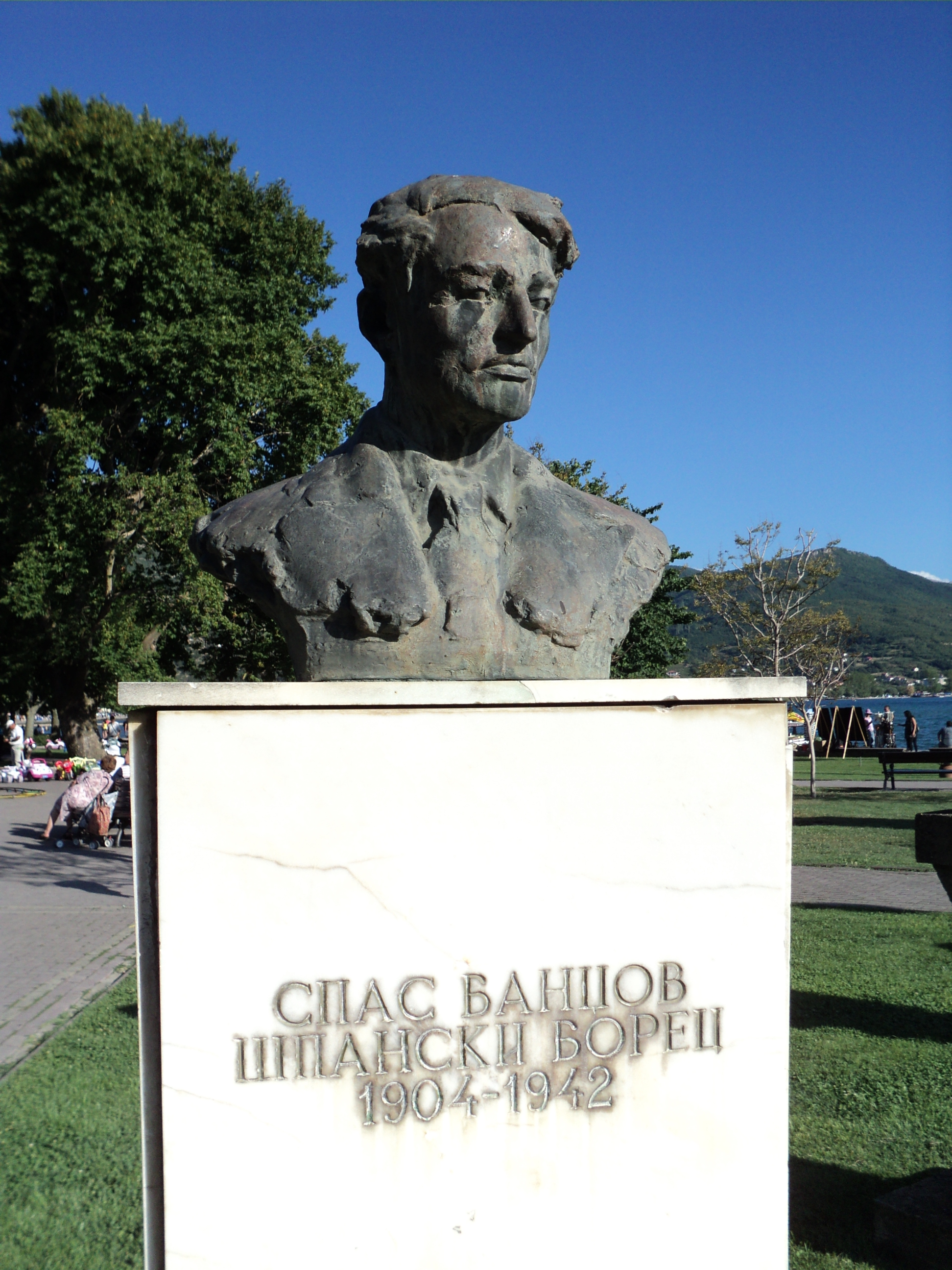 Bista španskog borca Spasa Bandžova u Ohridu Licensing